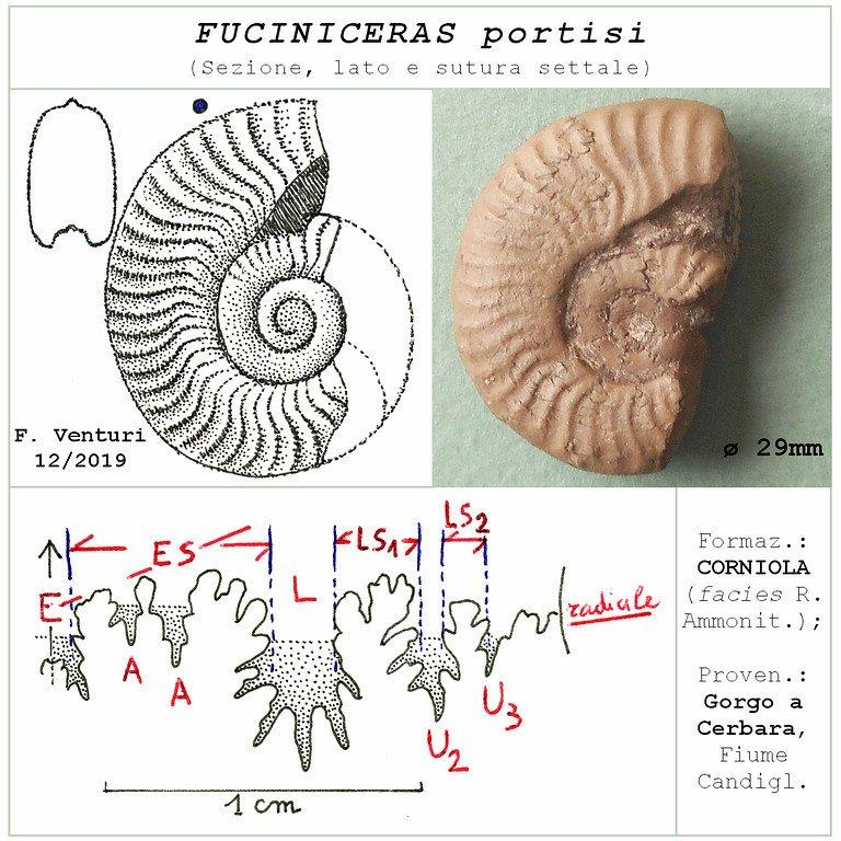 ammonite proveniente dagli strati del Domeriano inferiore, fossile guida.